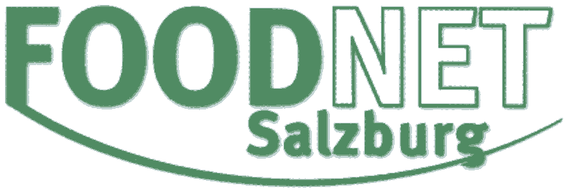 Altes FoodNet Salzburg-Logo